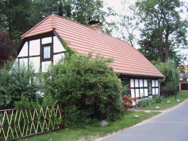 Haus in Schlepzig, Land Brandenburg, Deutschland Bild aufgenommen am 28.6.2006 von Olaf Meister